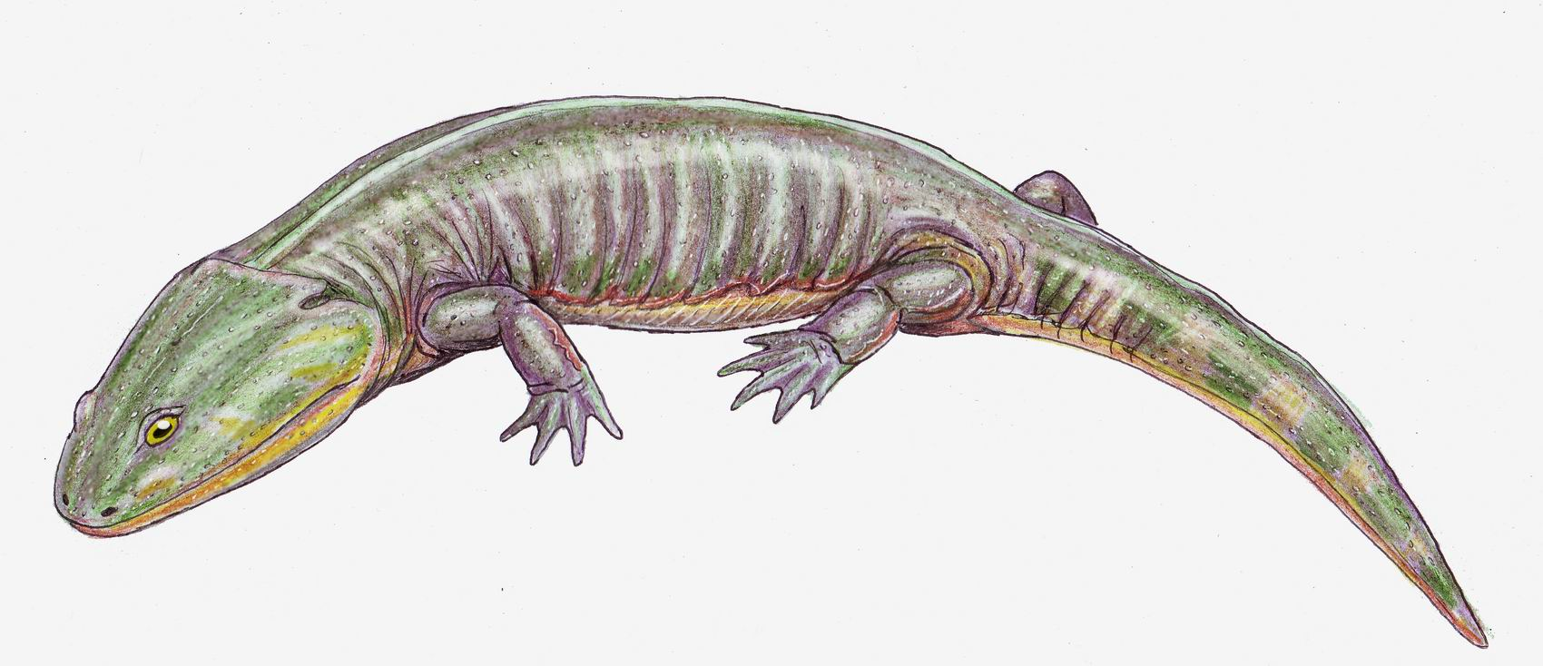 Apachesaurus